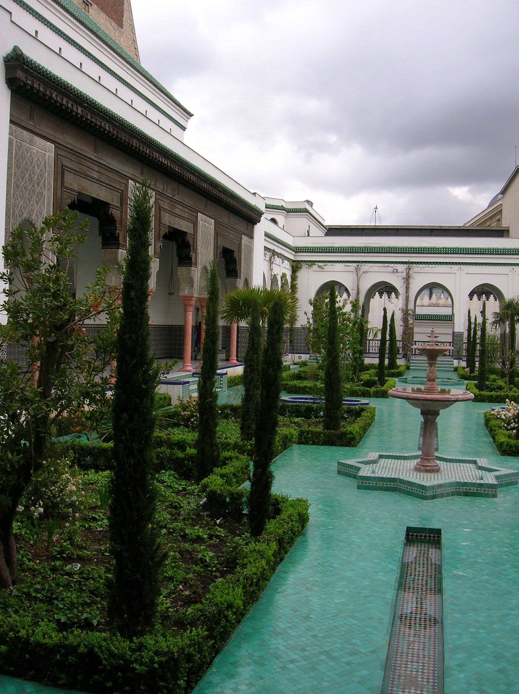 Patio de la Grande Mosquée de Paris